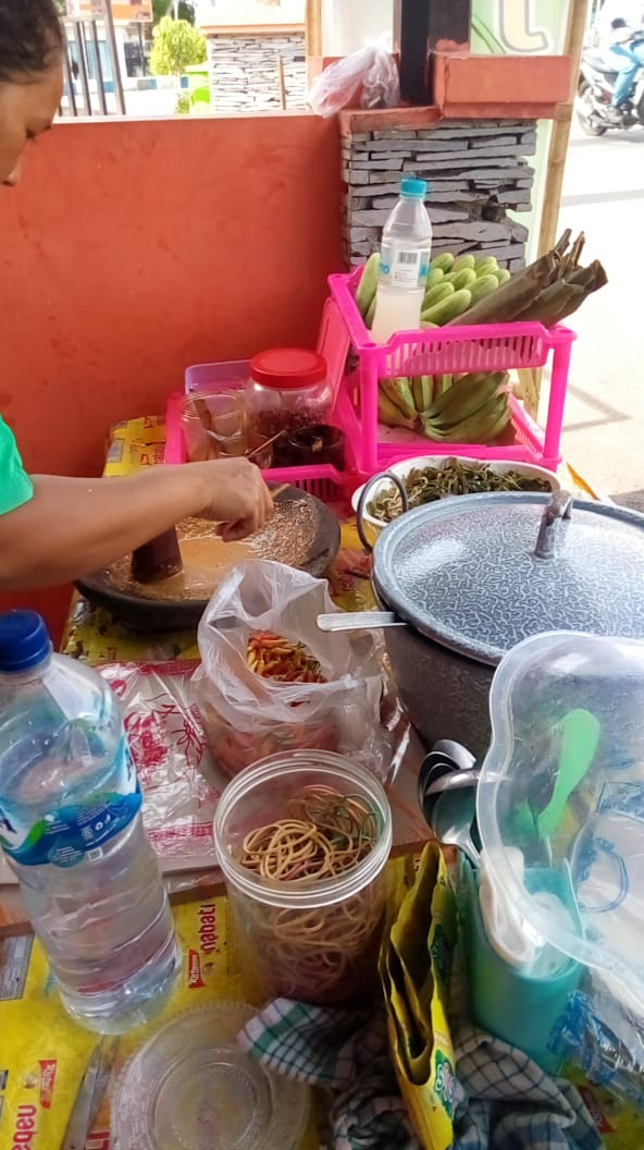 Proses penyajian tajin palappa